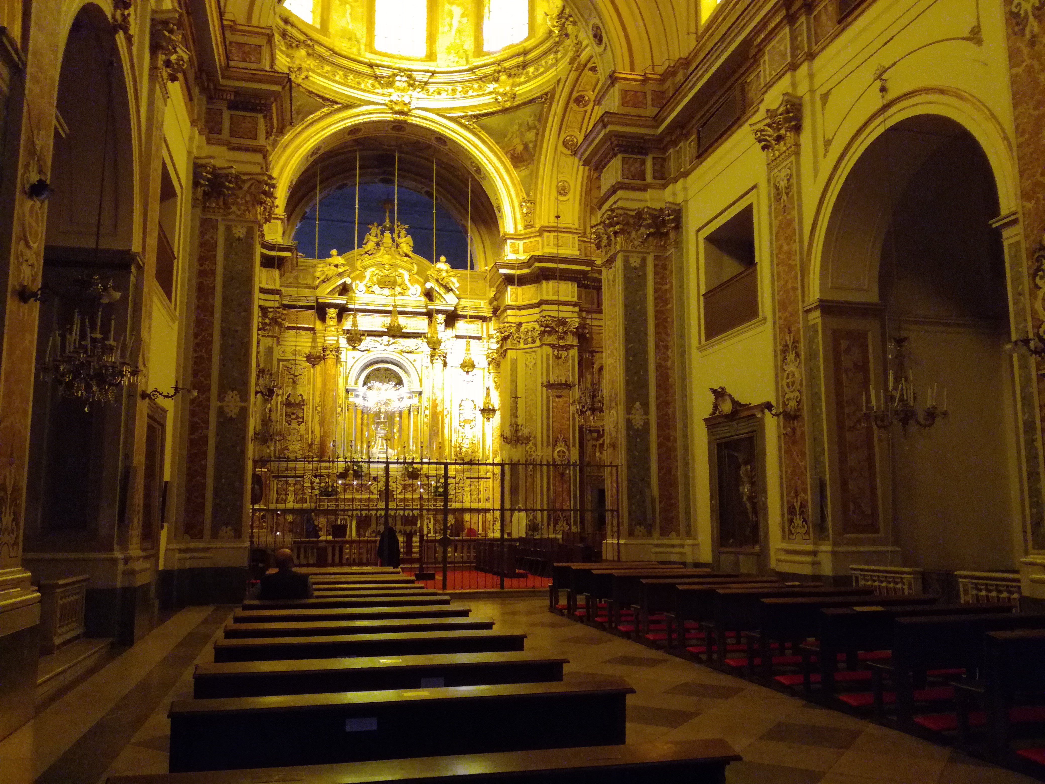 Interno San Giuseppe dei Ruffi, Napoli